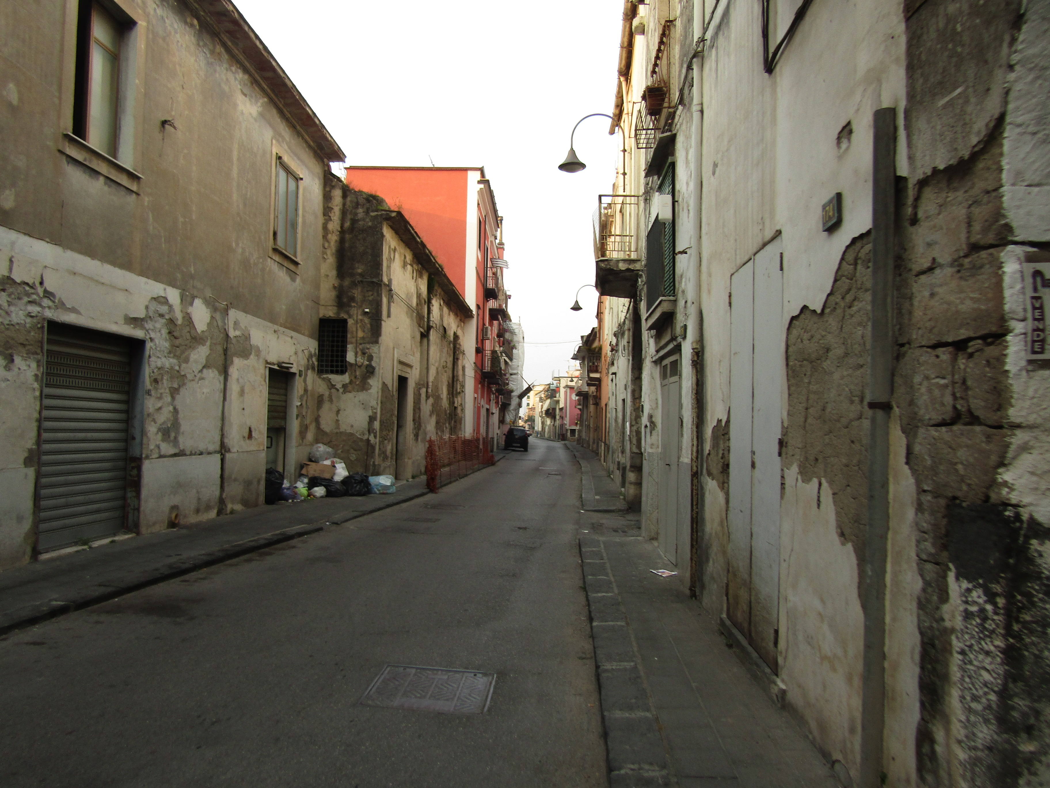 {Informazioni file |Descrizione = Cicalesi, Nocera inferiore. |Fonte = Mariano Rocco |Data = 22/02/2019 |Autore = Mariano Rocco |Licenza = vedi sotto |Detentore copyright = Mariano Rocco |EDP = |Altre versioni =}